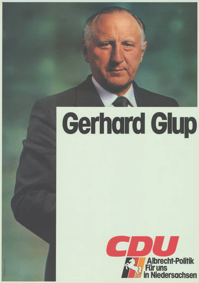 Gerhard Glup CDU Albrecht-Politik Für uns in Niedersachsen Abbildung: Foto - Nationalfarben mit Niedersachsenross Plakatart: Blanko-Motiv-/Ankündigungsplakat Auftraggeber: Verantw.: CDU Niedersachsen Objekt-Signatur: 10-008 : 404 Bestand: Landtagswahlplakate Niedersachsen (10-008) GliederungBestand10-18: Landtagswahlplakate Niedersachsen (10-008) » CDU Lizenz: KAS/ACDP 10-008 : 404 CC-BY-SA 3.0 DE